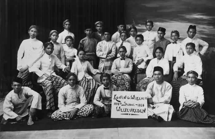 Foto. Groepsportret van leerlingen van de Koning Willem III school Weltevreden, schooljaar 1919-1920